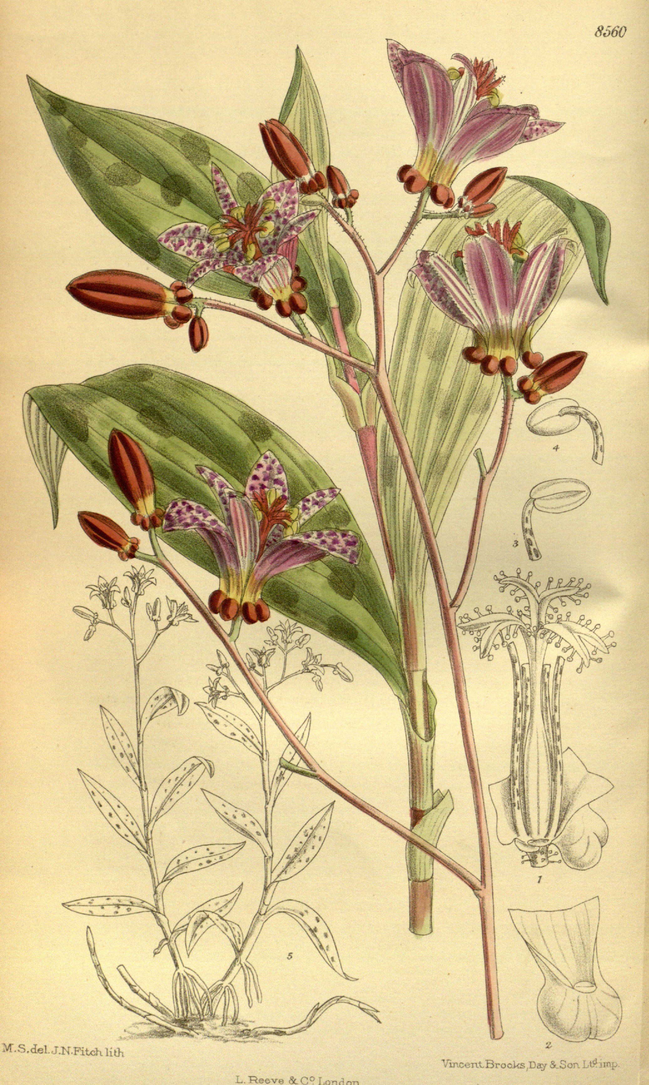 Tricyrtis stolonifera, Liliaceae